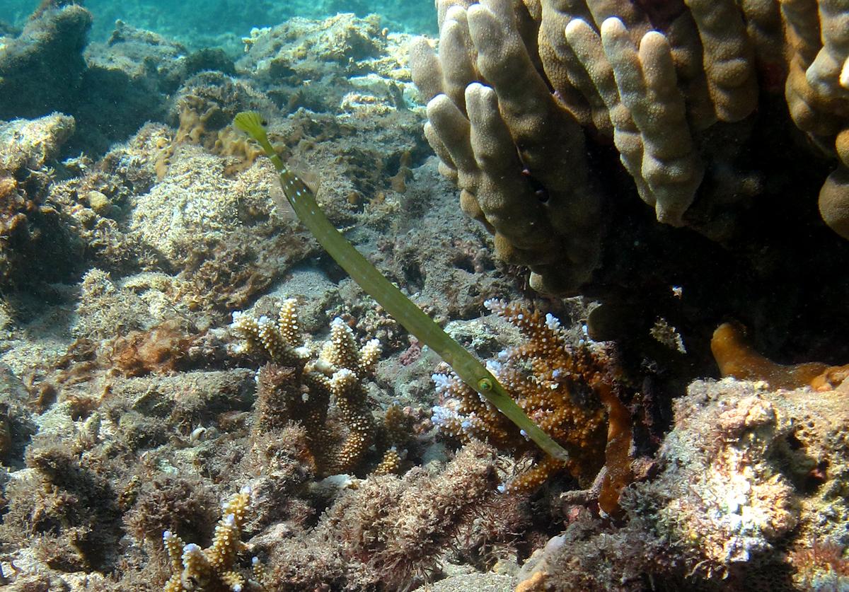 Un poisson-trompette de l'indo-pacifique (Aulostomus chinensis) à la Réunion.